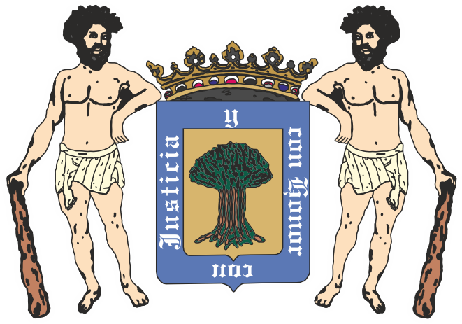 Dibujado a partir del oficial adoptado mediante decreto 3224/1973, de fecha 7 de diciembre (publicado en el BOE de 1 de enero de 1974)